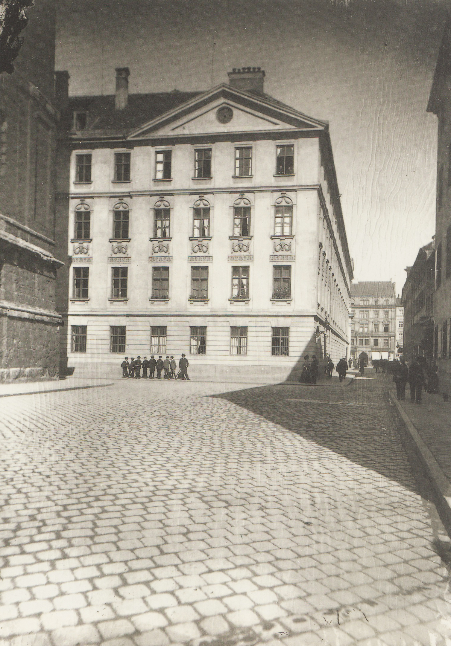 Das sog. Studiengebäude mit Ludwigsgymnasium und Hollandeum, gesehen von der Ettstraße, München. Hier stand früher ein Trakt des Karmelitenklosters